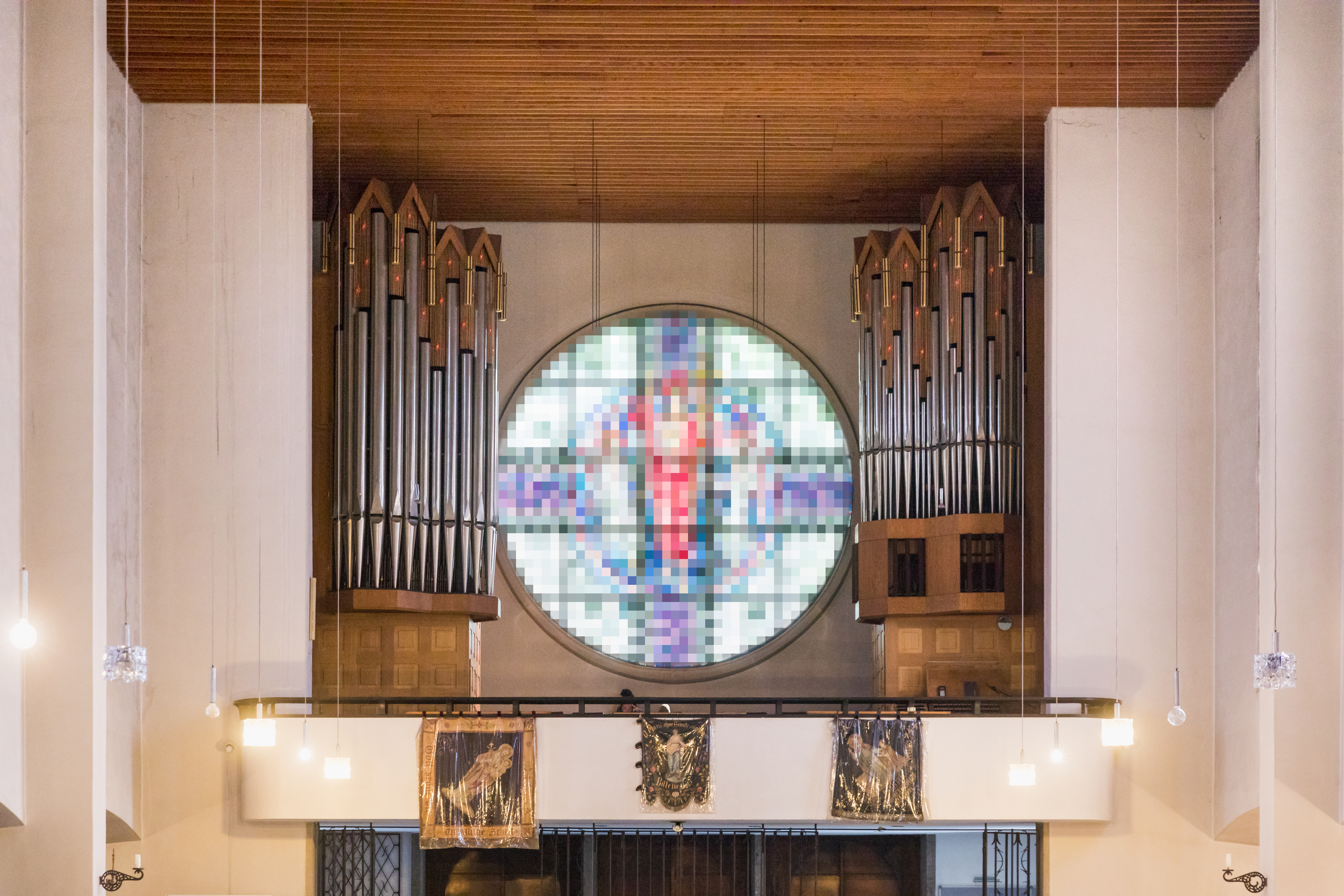 Kirche Heilig Kreuz, Köln-Weidenpesch. Architekt: Heinrich Bartmann, 1931. Orgelempore mit Fensterrosette von Hans Lohbeck (aus urheberrechtlichen Gründen verpixelt, kann 2045 im Original hochgeladen werden, bitte an meine Erben wenden).